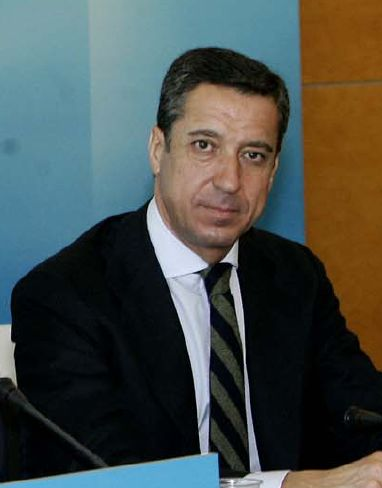 Eduardo Zaplana en la Conferencia Política sobre Modelo de Estado del Partido Popular celebrada en Madrid en noviembre de 2007.